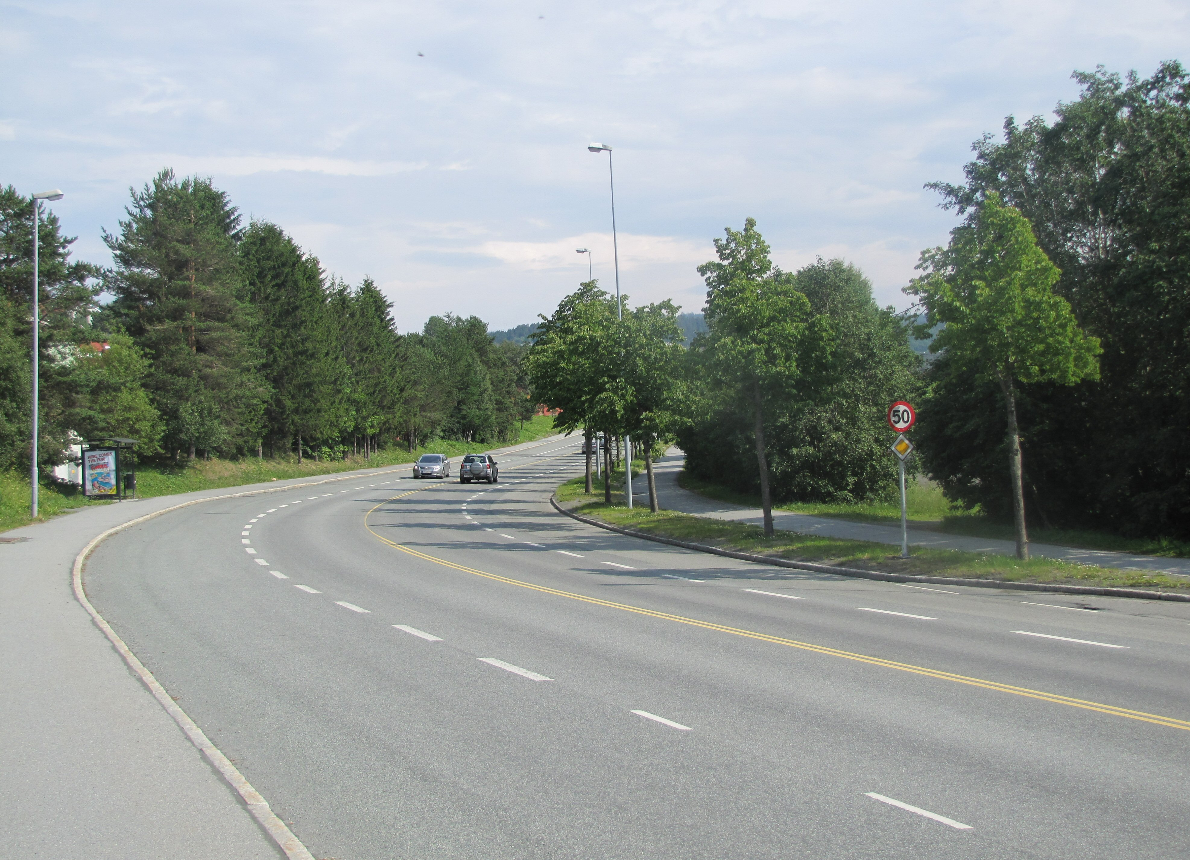 Torbjørn Bratts veg (FV860), Trondheim